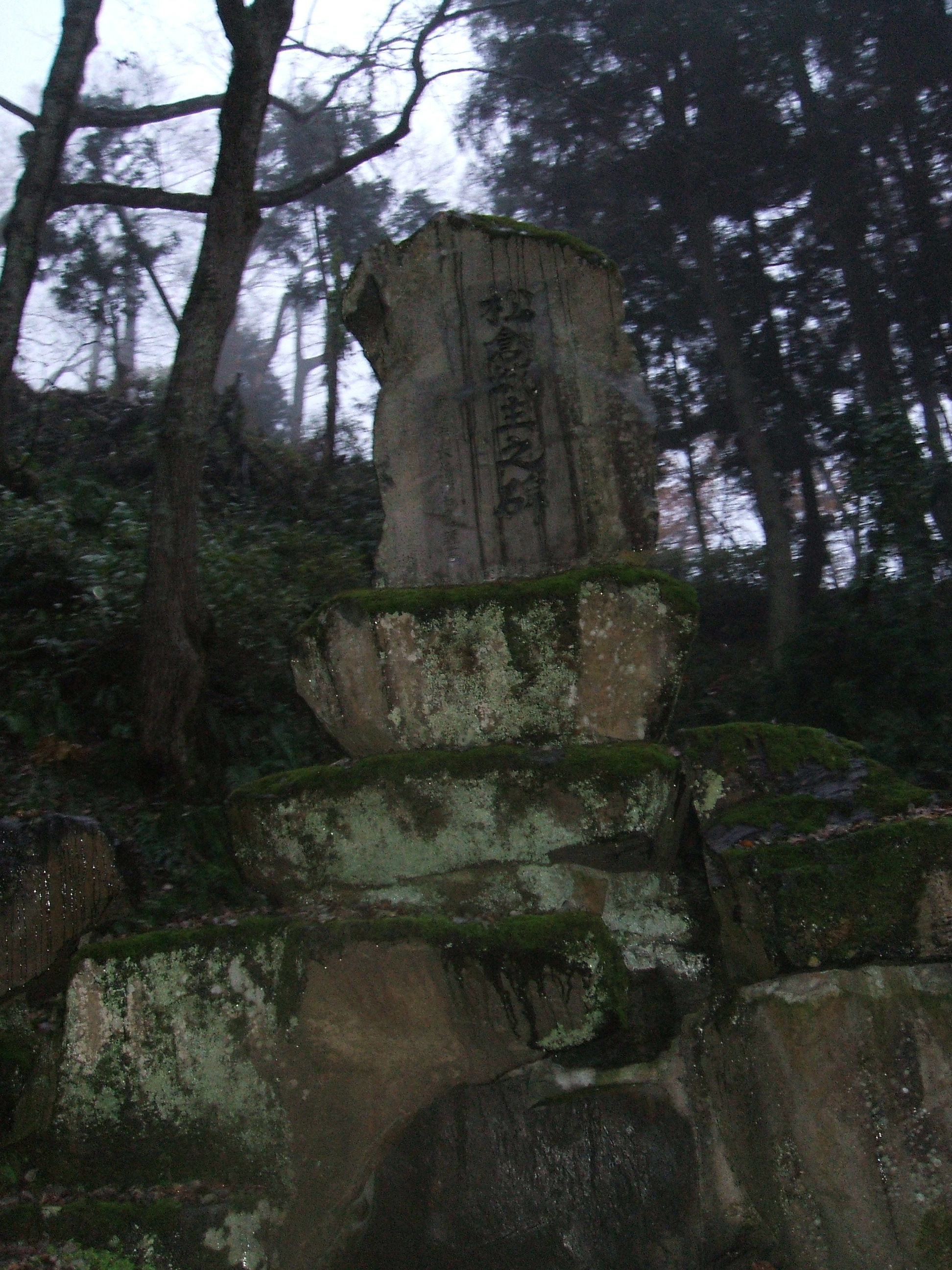 日本の富山県魚津市にある松倉城にある「松倉城主の碑」